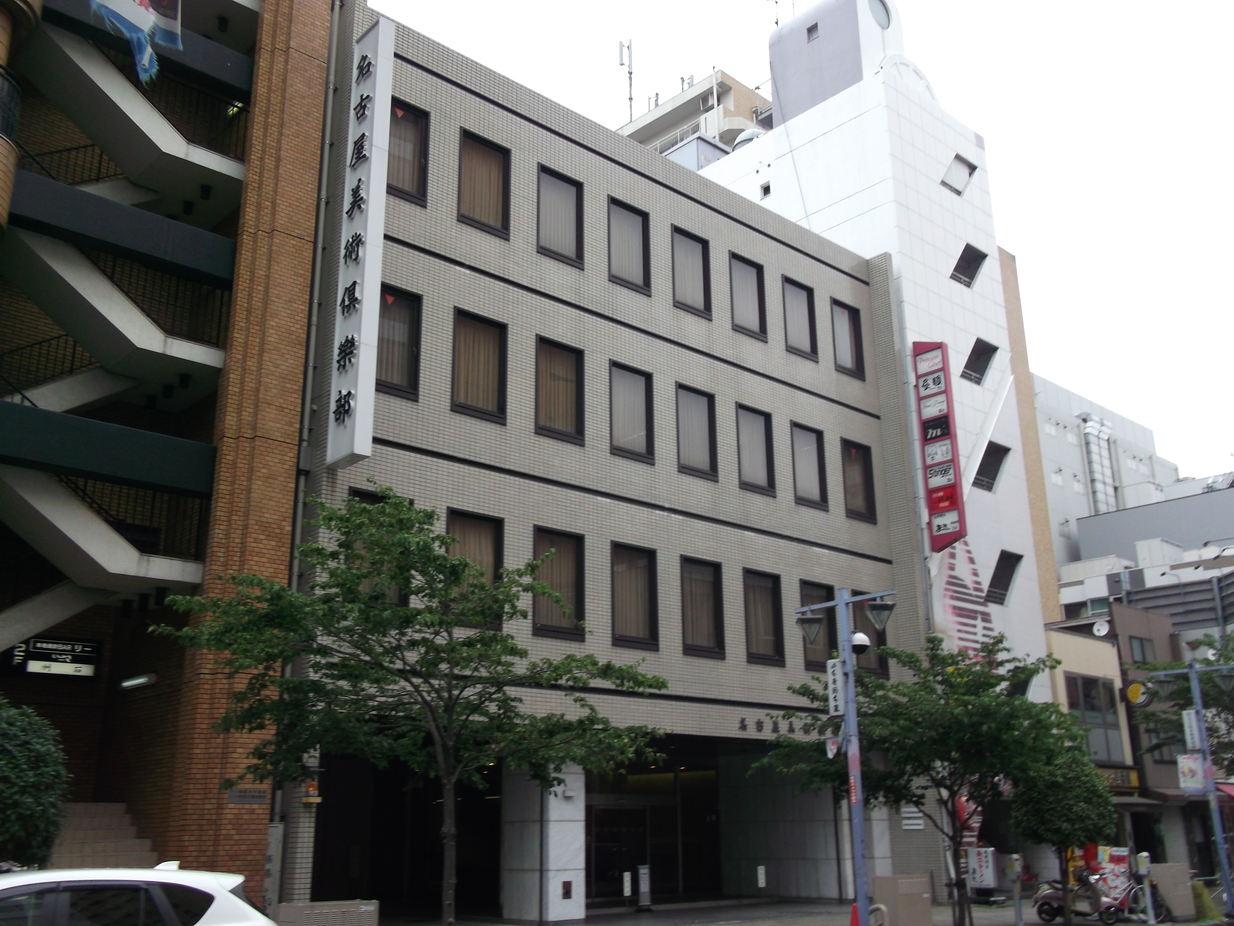 名古屋市中区栄の名古屋美術倶楽部を東側公道南側より撮影